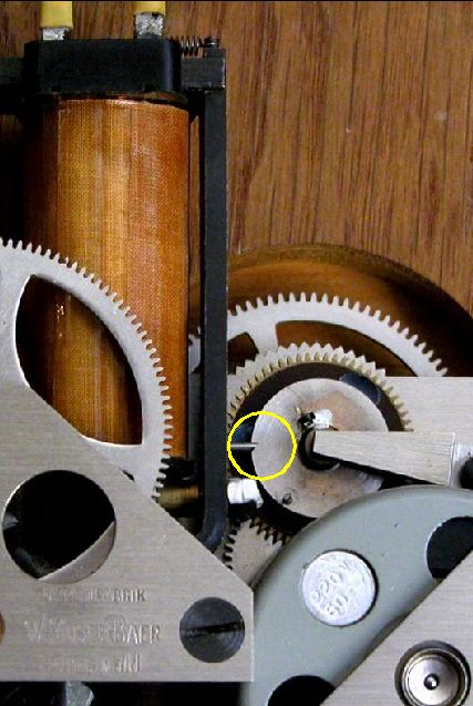 Schweizer Bahnhofsuhr: Synchronmotor zum Antrieb des Sekundenzeigers; Stopp durch in Scheiben-Nut einrastenden Stift; Motor dreht weiter, Rutschen der Reibungskupplung zwischen Scheibe mit Nut und dahinter befindlichem Zahnrad; Freigabe des Sekundenzeigers durch Herausziehen des Raststiftes mittels Magnet: oben gelagerter Anker-Hebel wird im Uhrzeigersinn gedreht.